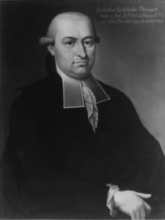 Gemälde in der Professorengalerie Tübingen